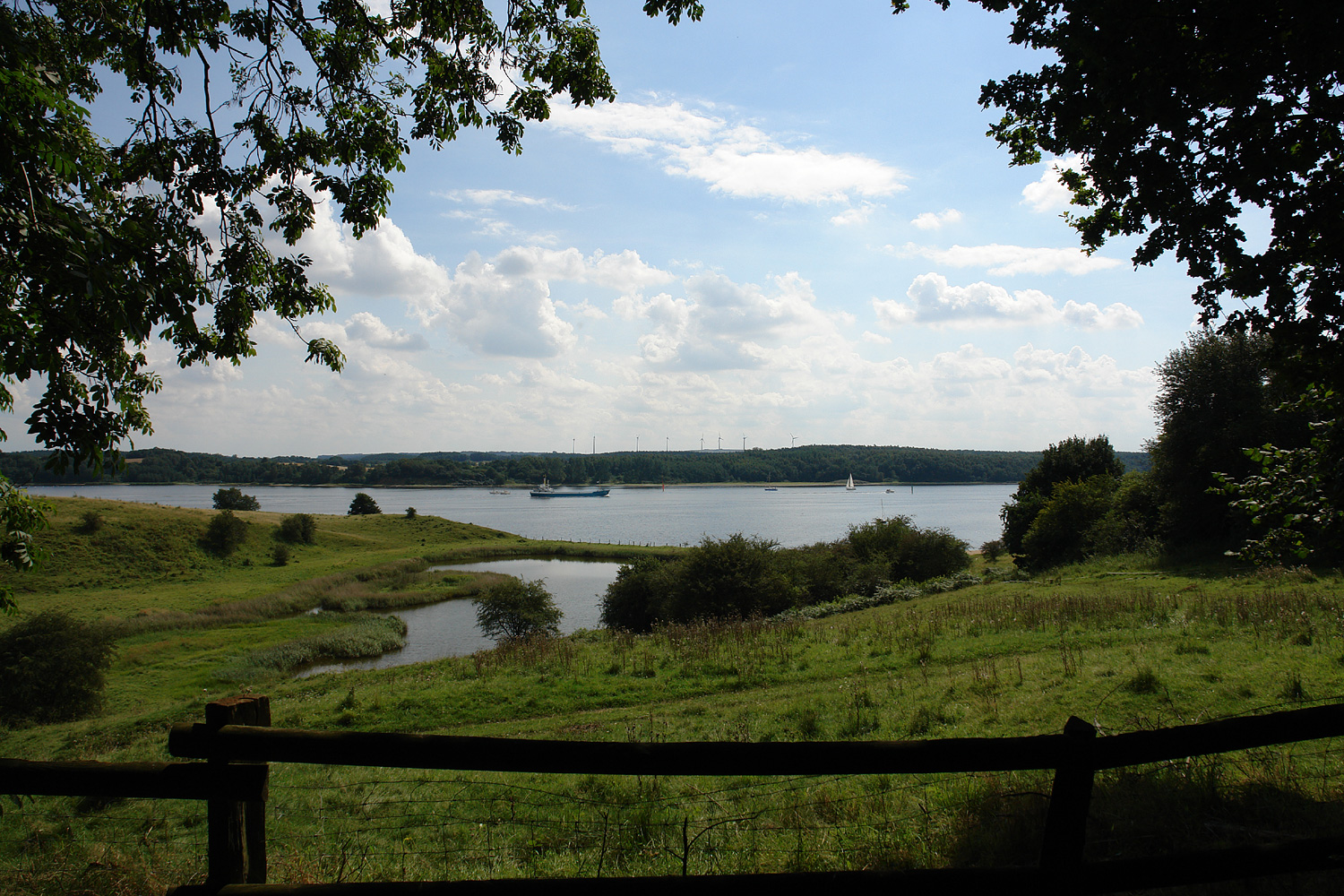 Stülper Huk im Naturschutzgebiet „Dummersdorfer Ufer“. Blick auf den Silkteich und das mecklenburgische Ufer im Bereich des OT Teschow der Gemeinde Selmsdorf